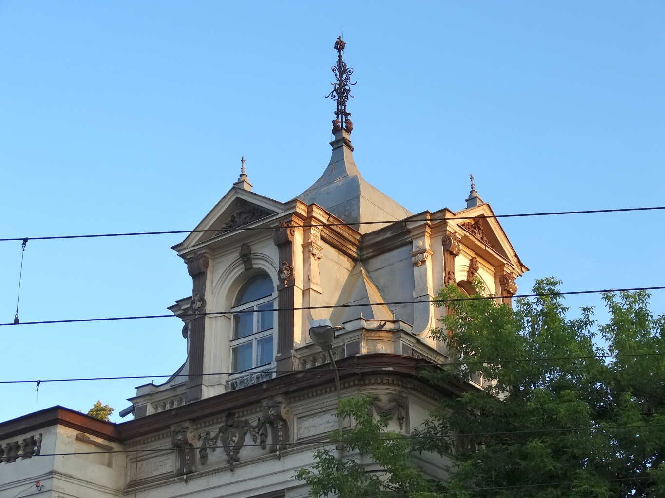 Willa fabrykanta, właściciela Fabryki Obrabiarek do Drewna Carla Blumwe - ul. Nakielska 53 w Bydgoszczy (1891)